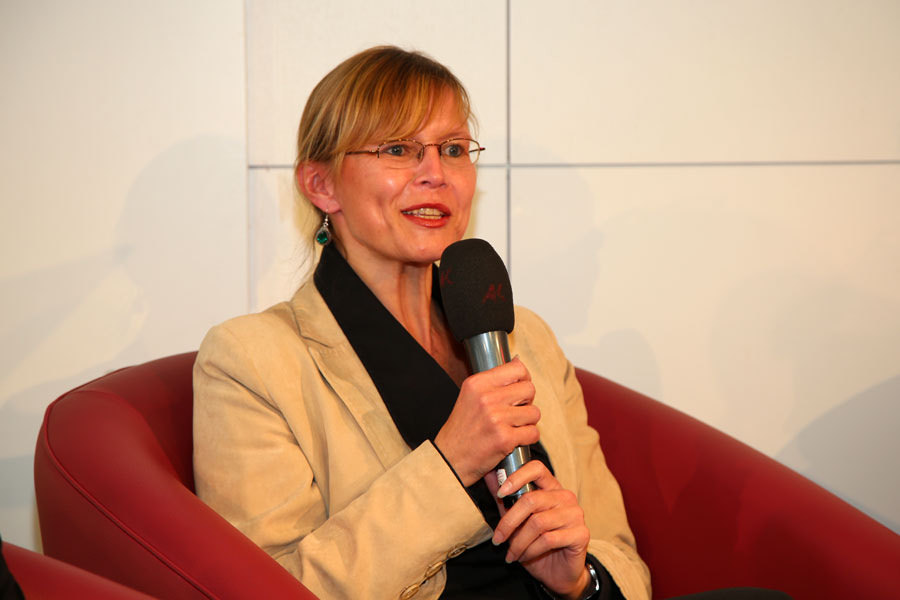 Beatrix Karl-6518